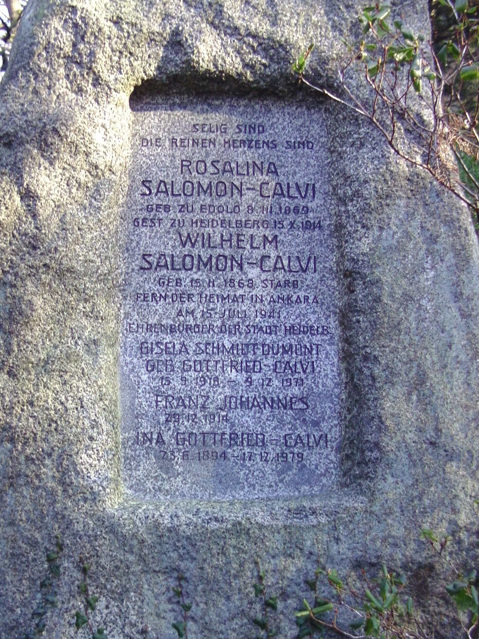 Ausschnitt Grabmal Rosalina Salomon-Calvi und Wilhelm Salomon-Calvi Heidelberger Bergfriedhof